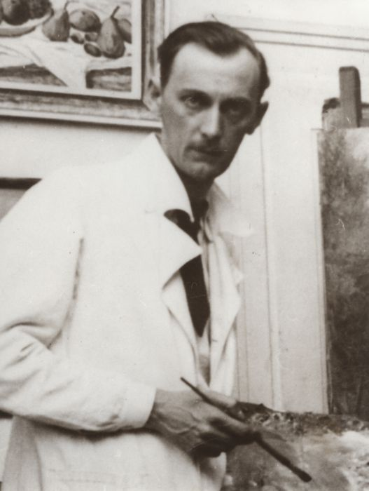 Bohumil Chlebovský (1902-1954), akademický malíř a grafik